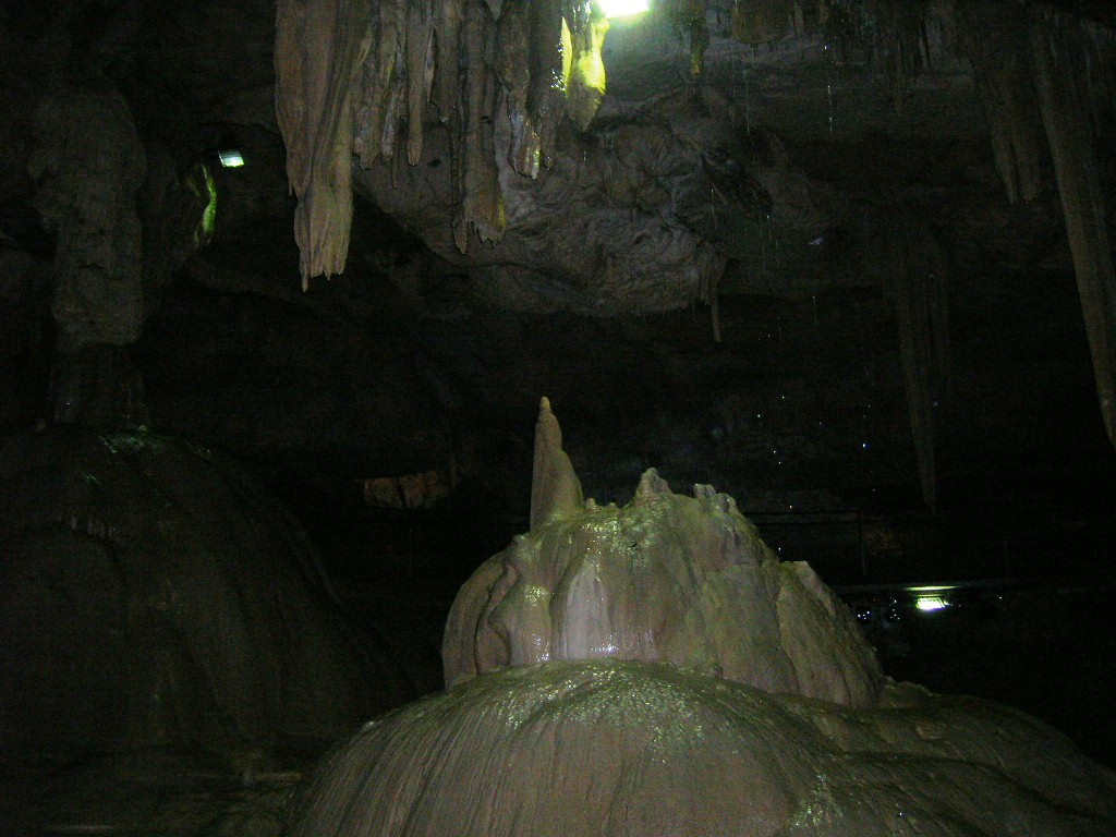 Interno delle grotte di Bétharram